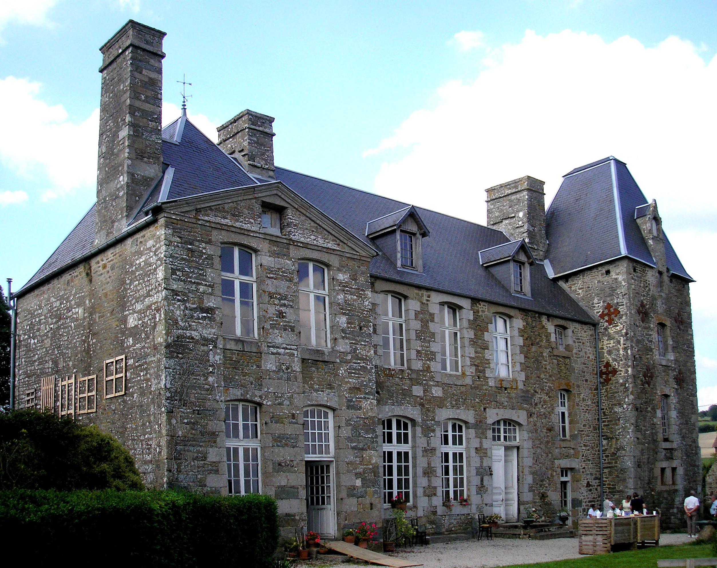 Malloué (Normandie, France). Le château.